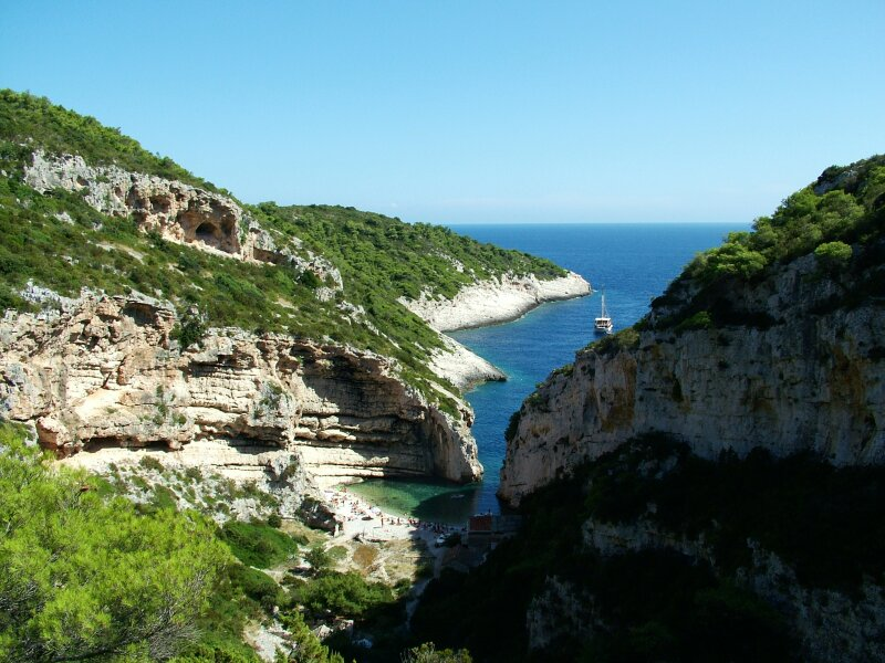 Zatoka Stiniva na wyspie Vis